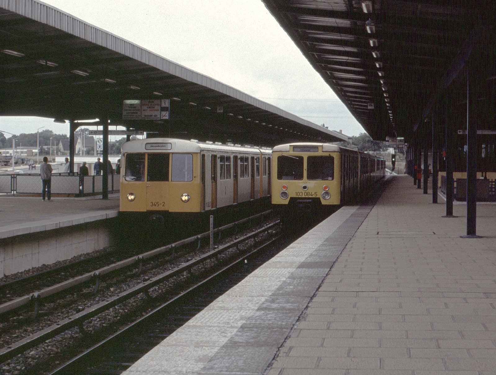 Baureihen D und EIII im Bahnhof Wuhletal